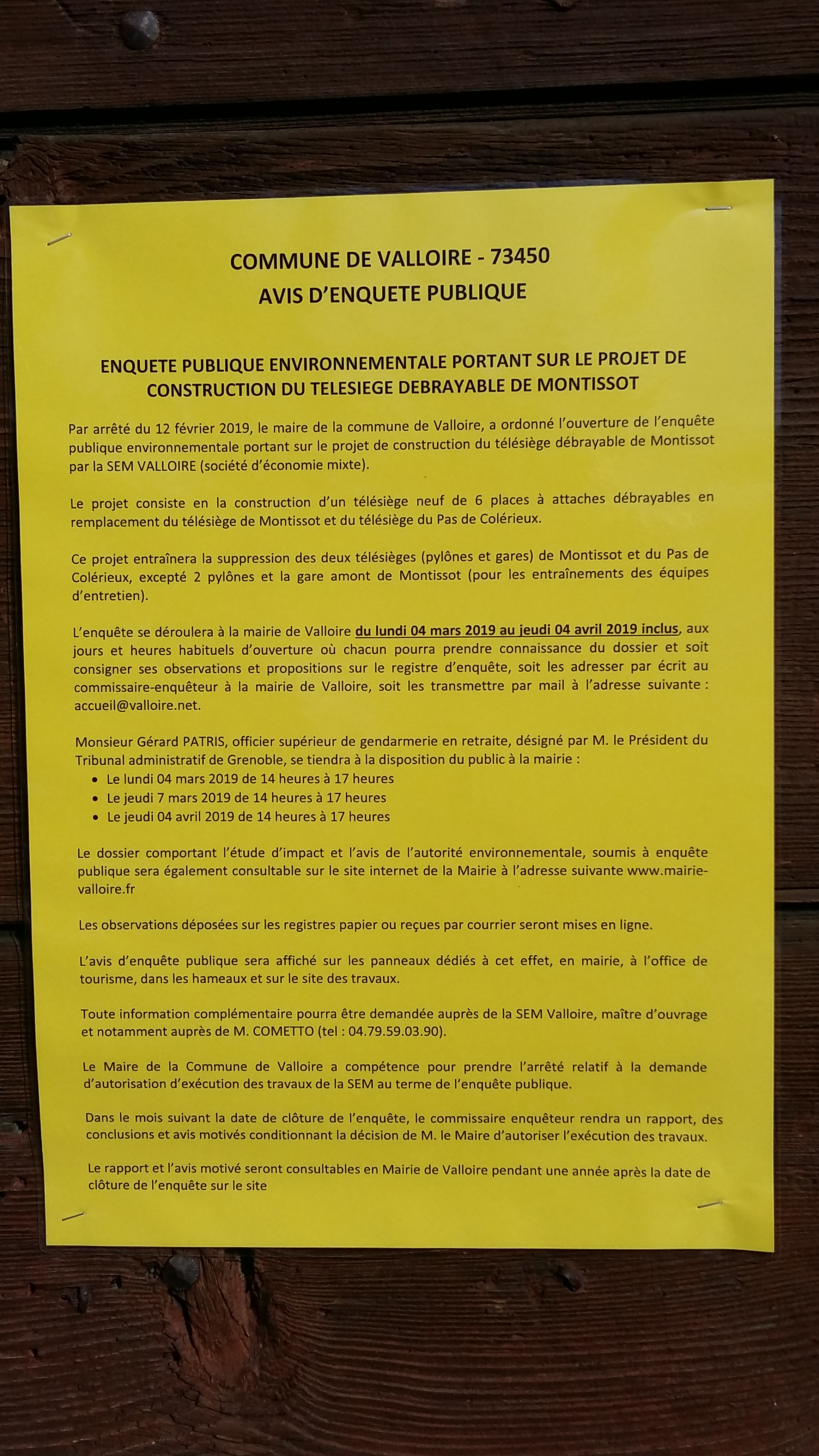 Affiche au format règlementaire d'ouverture d'enquête publique, pour un projet de télésiège débrayable, placardée sur une porte en bois au hameau de La Ruaz